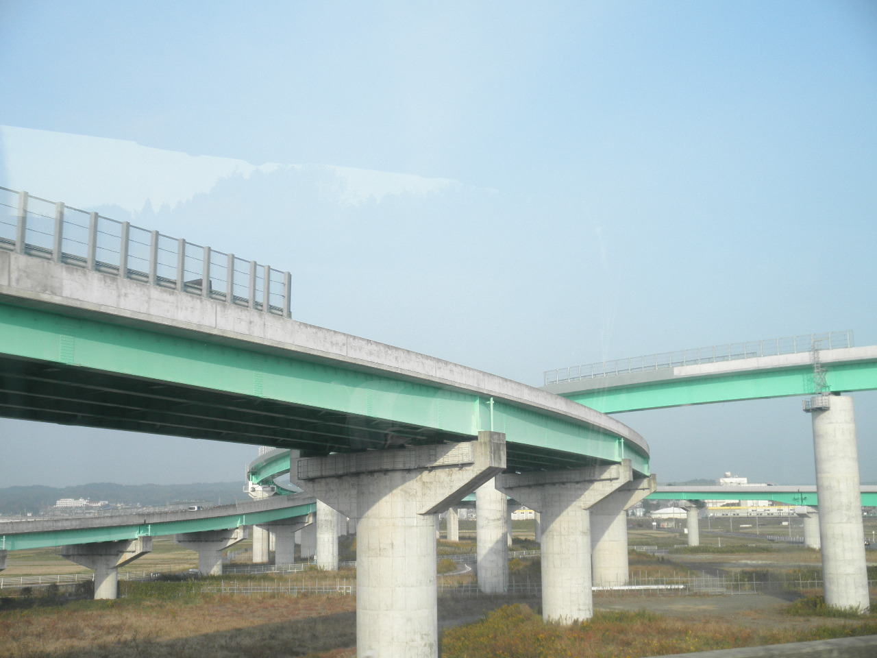 利府ジャンクション